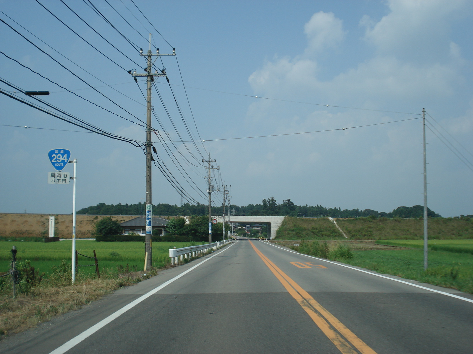 国道294号 栃木県真岡市八木岡付近 先の交差する道路は建設中の北関東自動車道